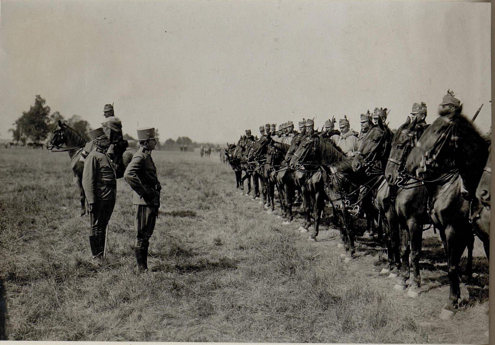 Erzherzog Karl war von Juni 1916 an, Oberkommandierender eines Teilabschnittes der Ostfront und befehligte mehrere Armeen zwischen Brody und den Karpaten. Im Rahmen dieses Kommandos inspizierte Erzherzog Karl seine ihm zugeordneten Einheiten.